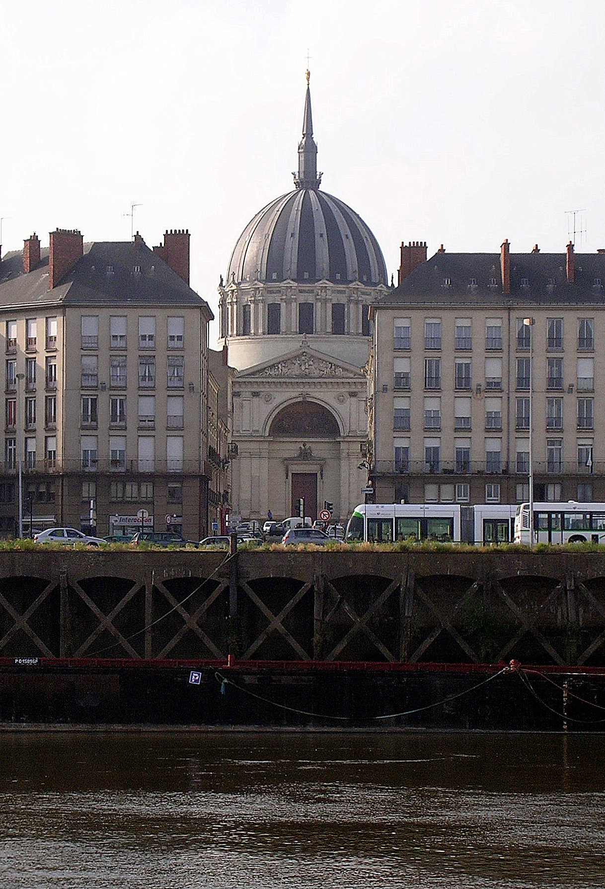 Église Notre-Dame-de-Bon-Port, à Nantes (France). On aperçoit la Loire et le tramway nantais. Vue depuis l'île de Nantes.